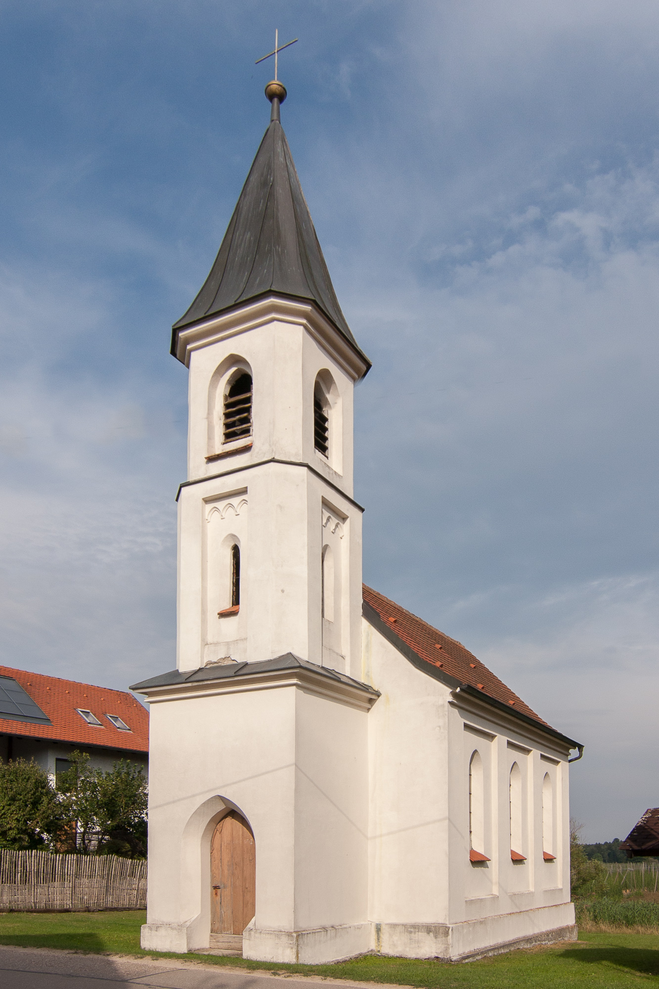 Kapelle; von 1884, neugotisch; mit Ausstattung.This is a photograph of an architectural monument.